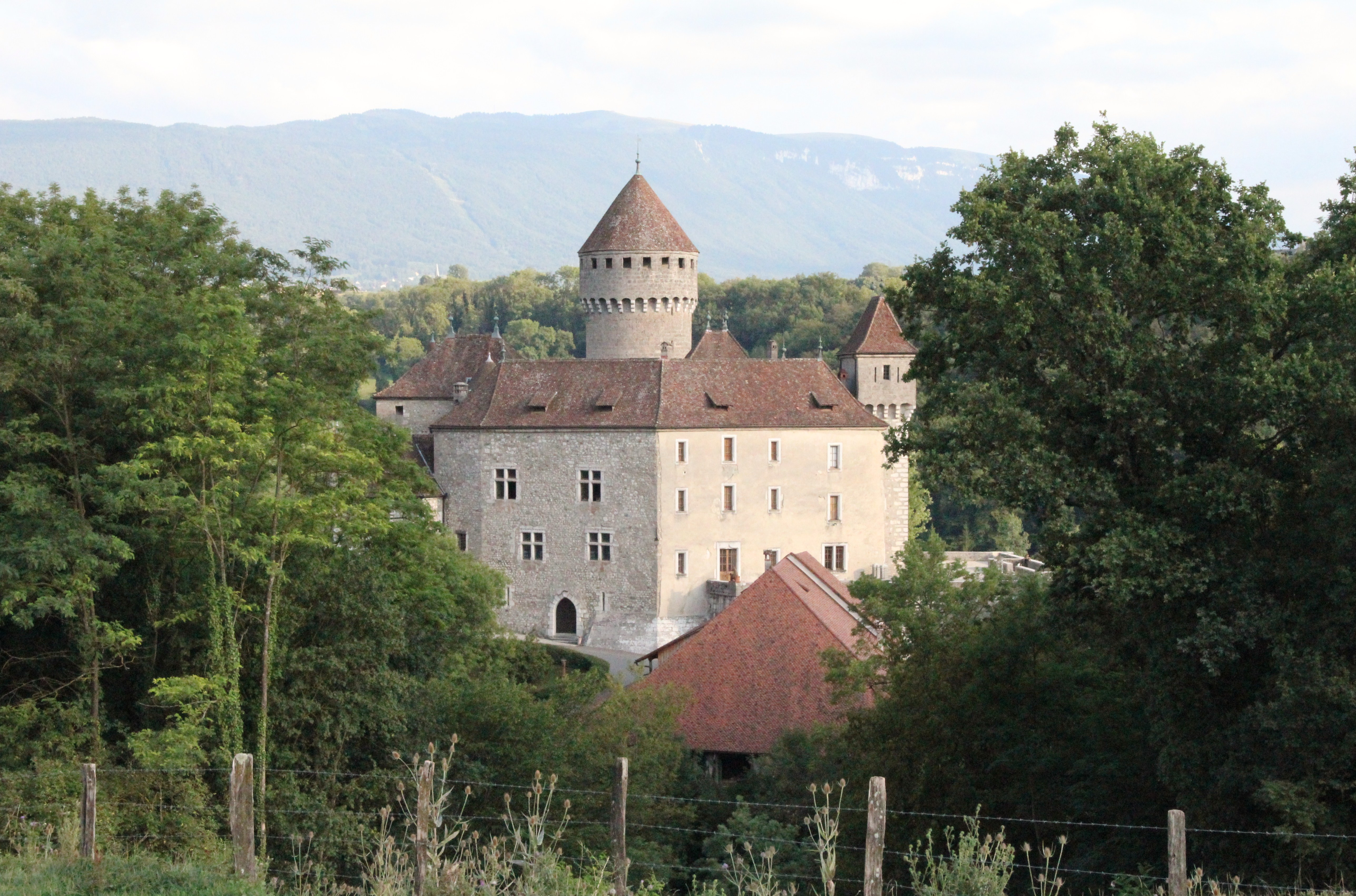 This building is en partie classé, en partie inscrit au titre des Monuments Historiques. .